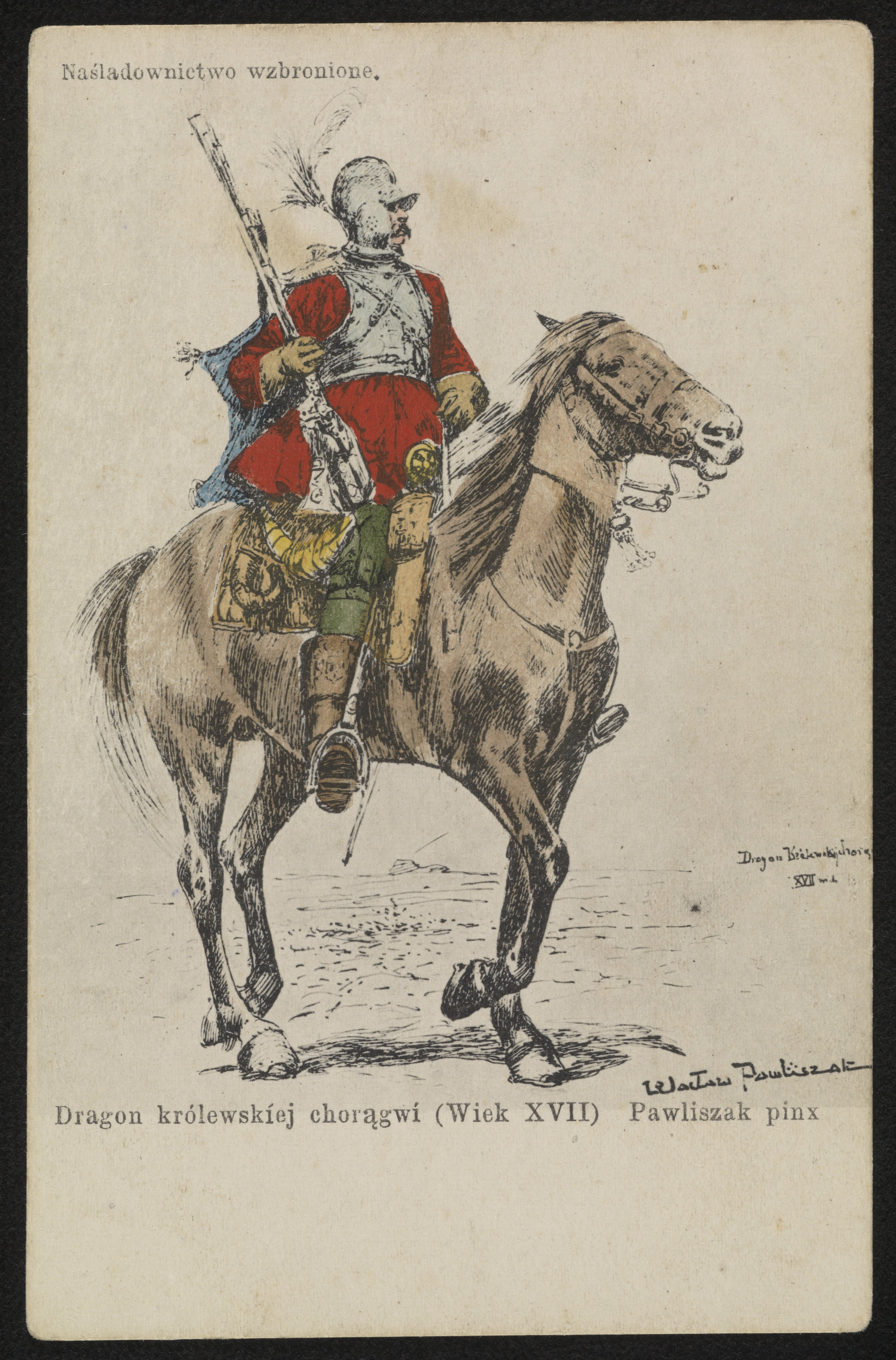 [1] karta : ilustracja ; 14x9 cm